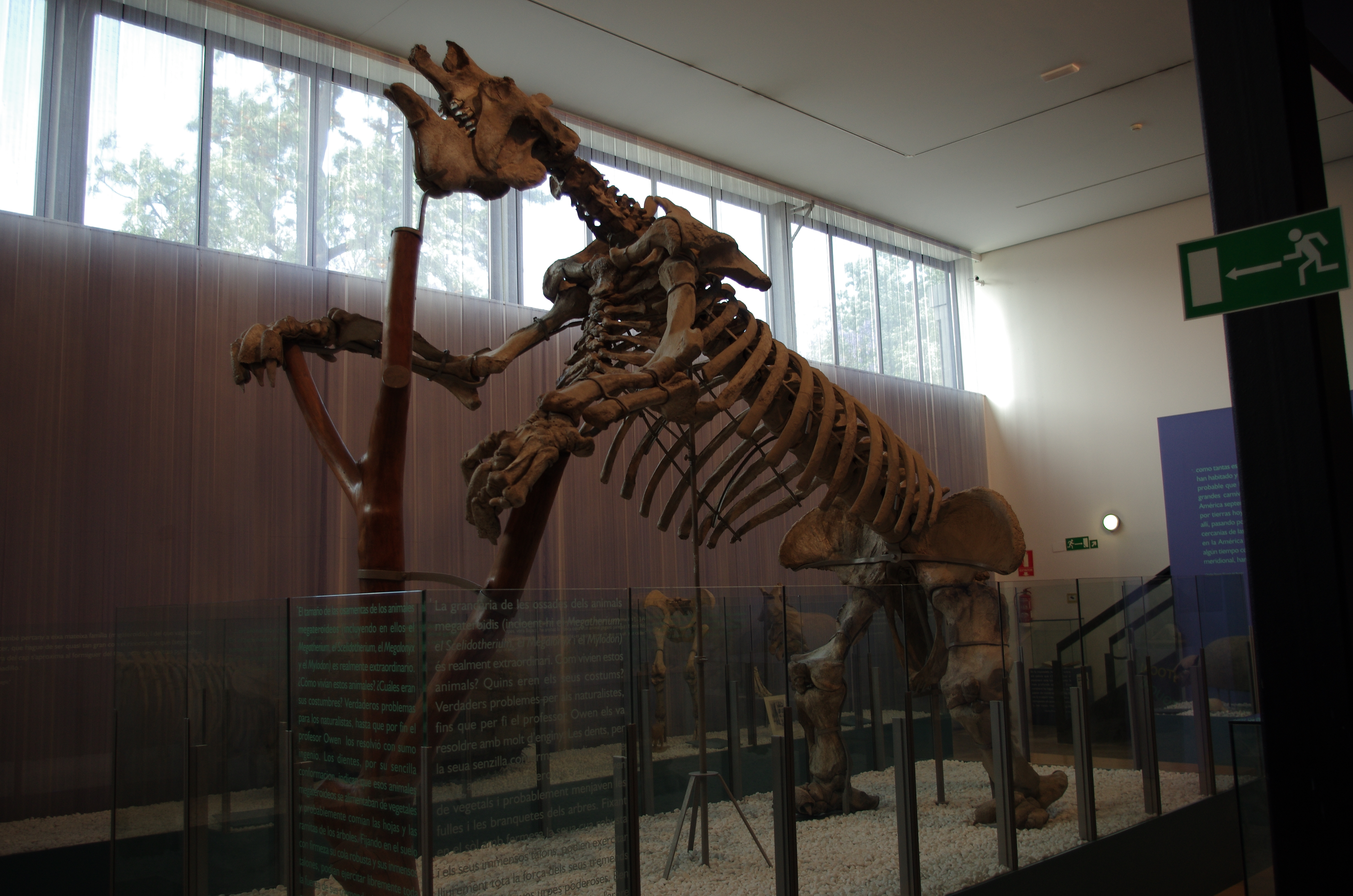 Megaterio en el Museo de Ciencias Naturales de Valencia